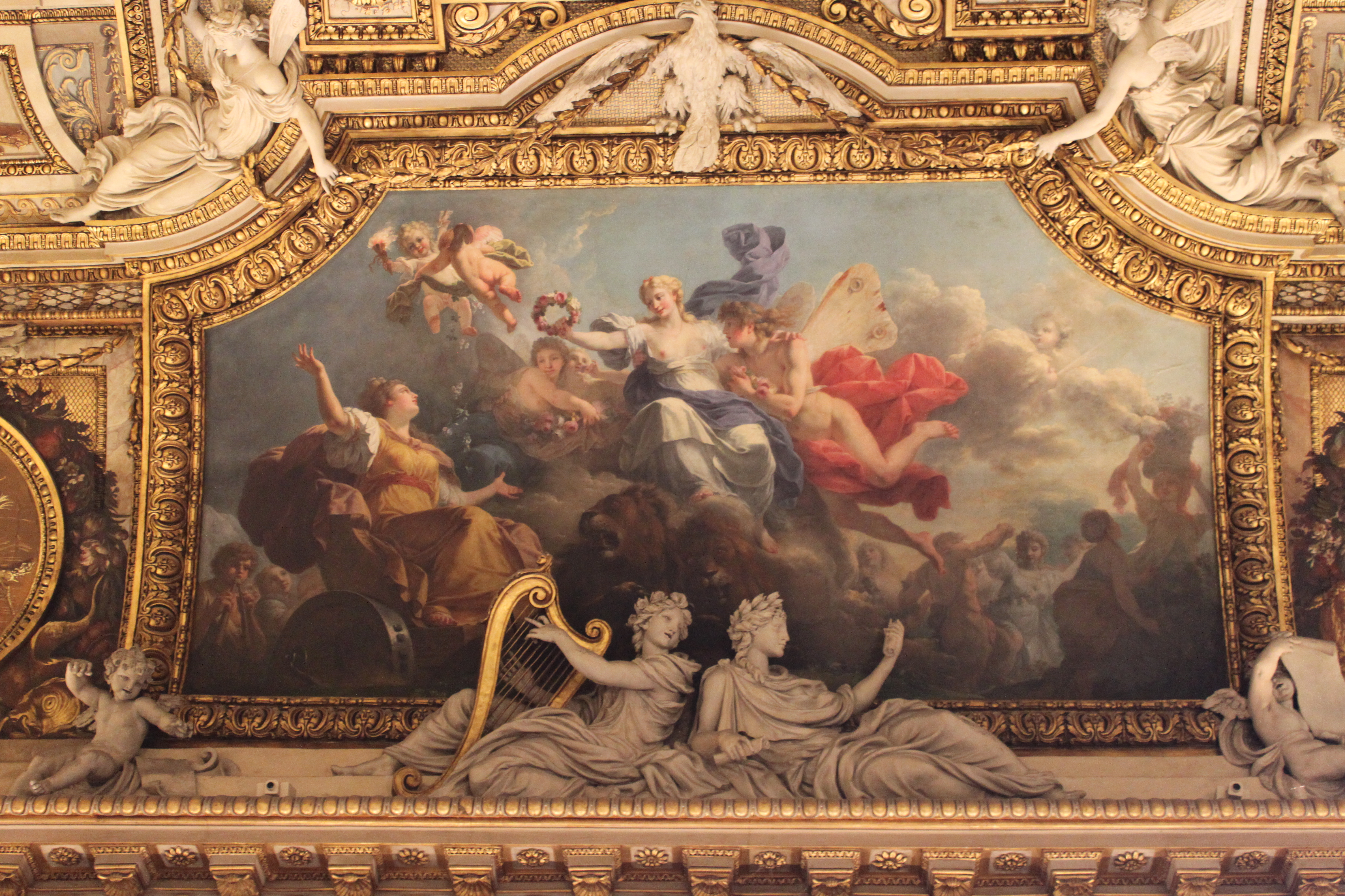 Le Printemps ou Zéphyr et Flore couronnant Cybèle par Antoine-Francois Callet, peinte en 1780-81 Galerie d'Apollon, Musée du Louvre, Paris Huile sur toile marouflée sur voûte Dimensions : hauteur : 53.5 cm ; 96.5 cm